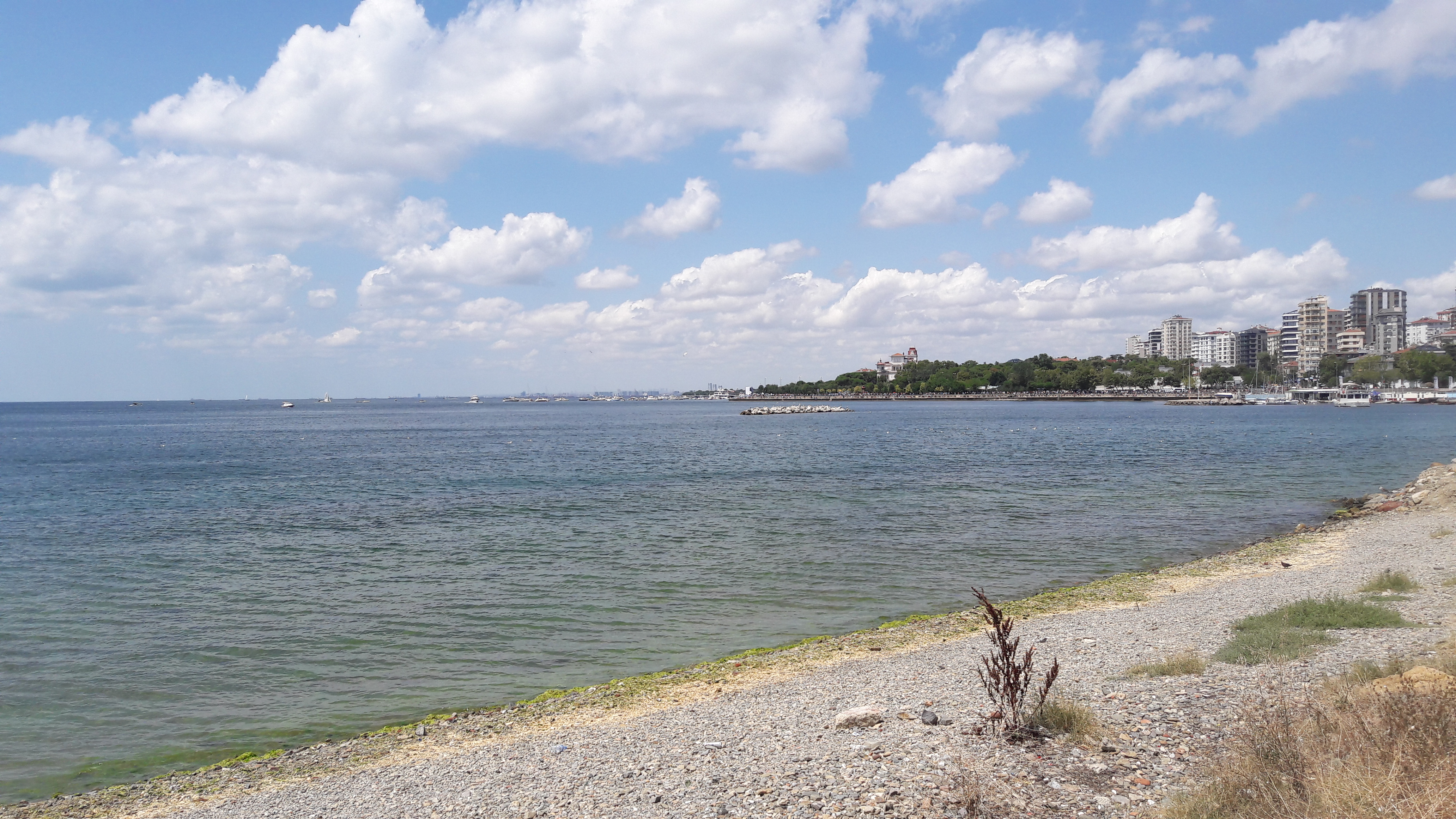 Bostancı Sahil